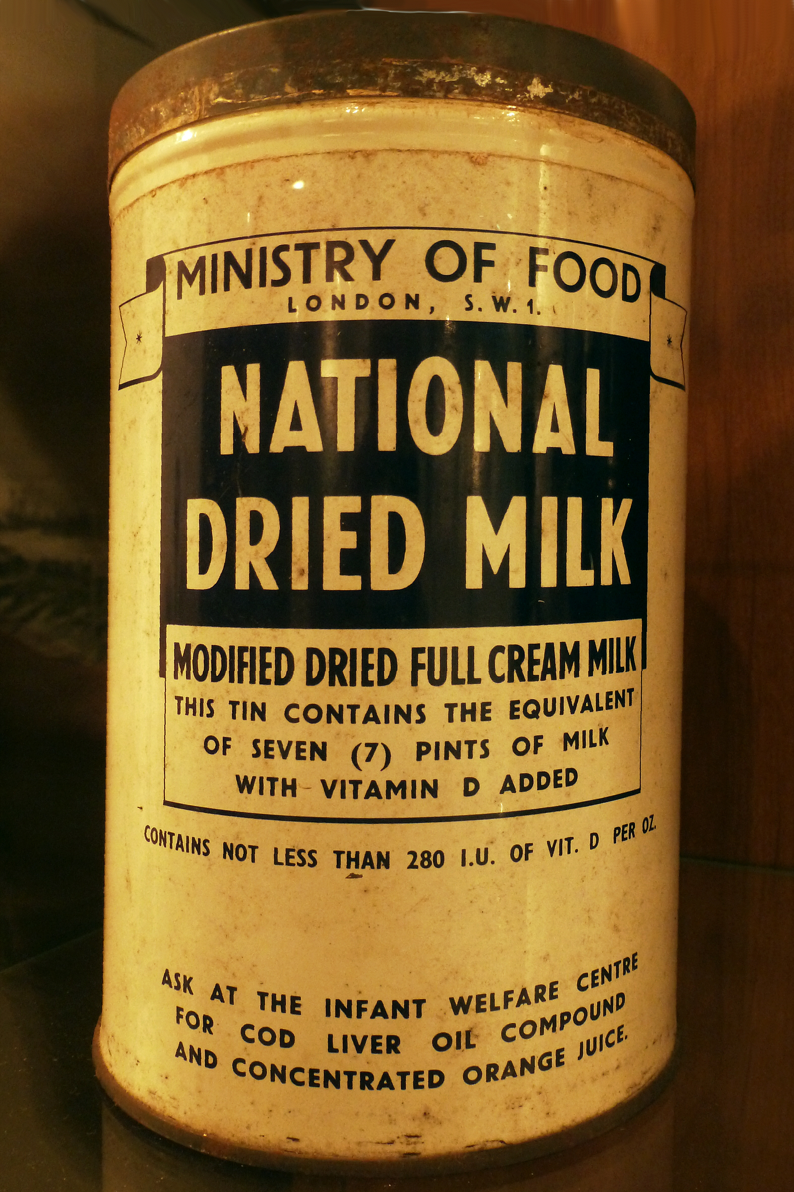 Modifizierte Trocken-Vollmilch, angereichert mit Vitamin D. Originaldose aus dem Jahre 1947 des Ministerium für Ernährung, London, UK.